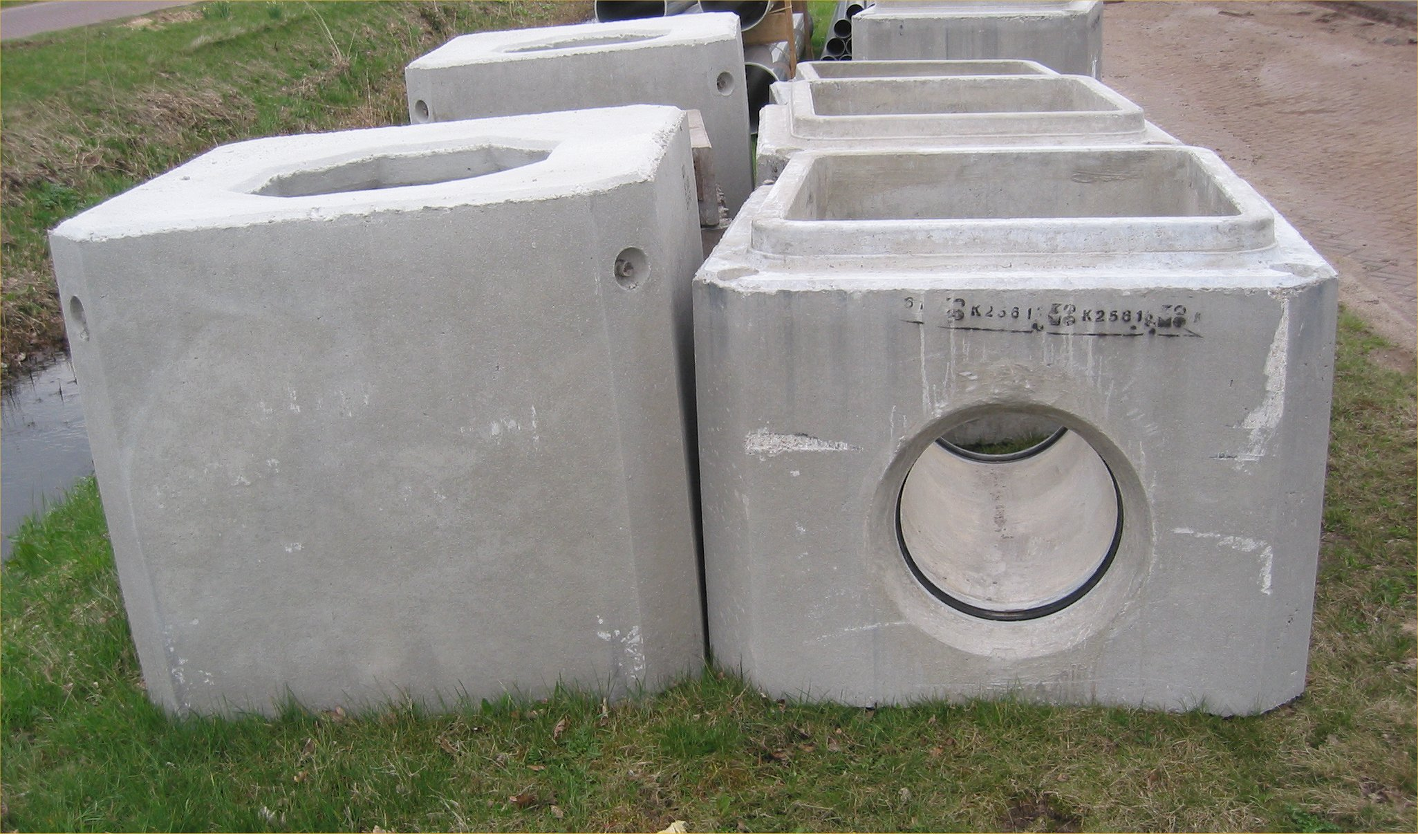 Rioolputten (Sewer